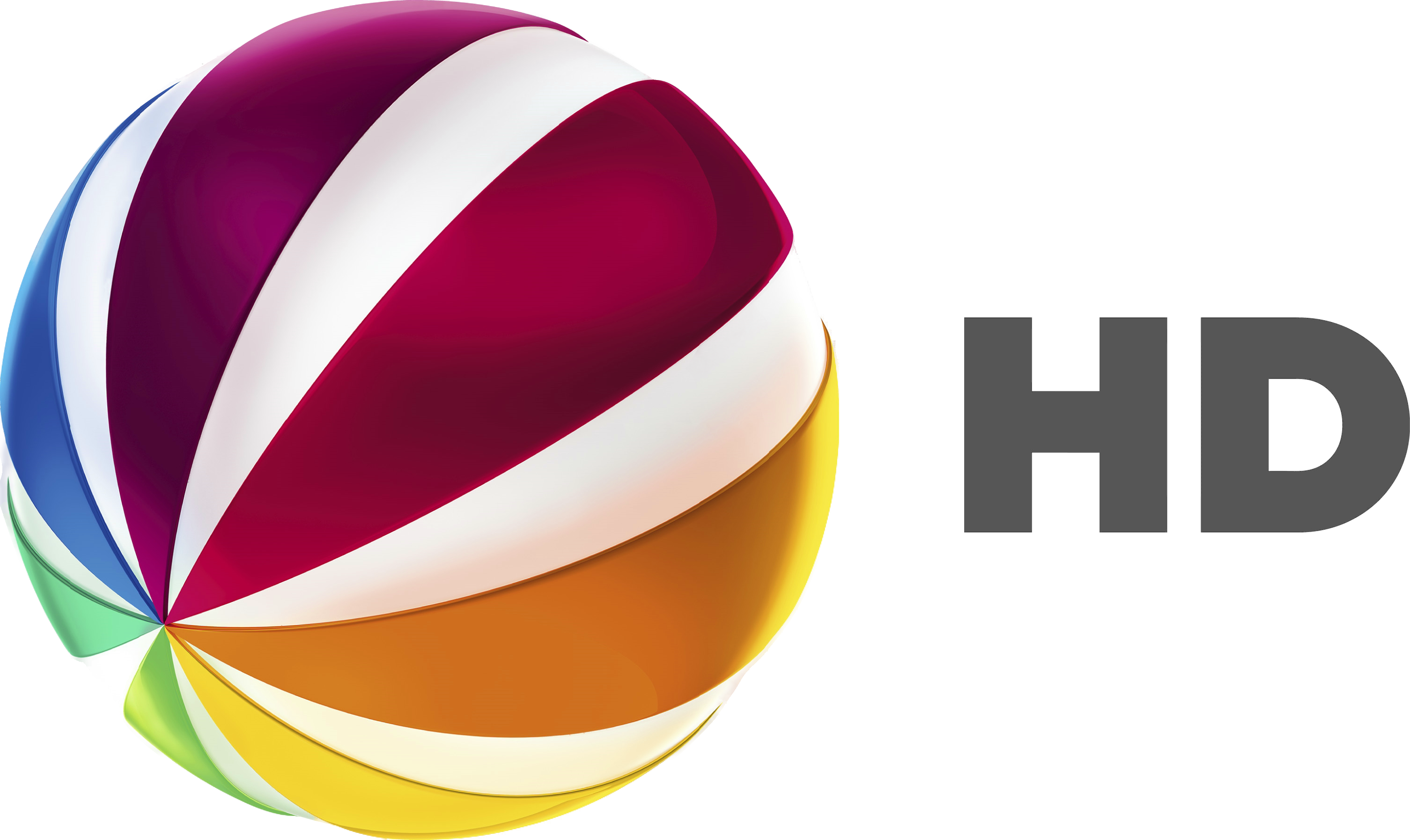 Sat. 1 HD Logo